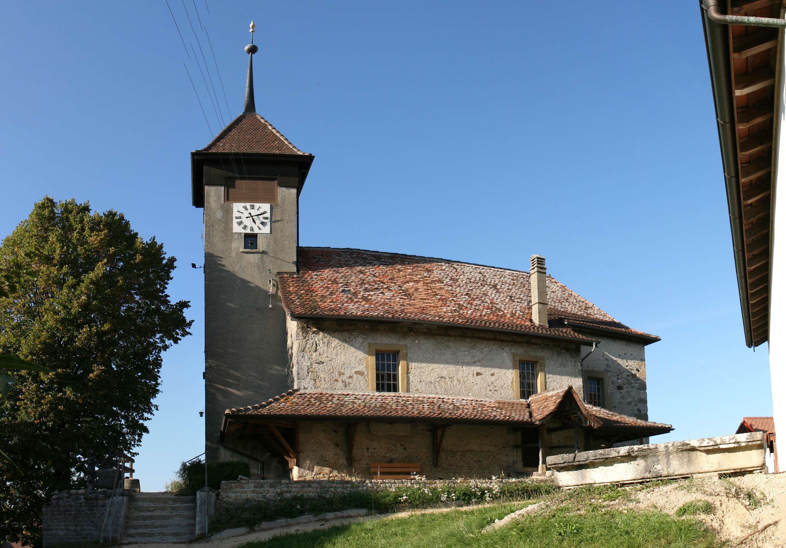 Eglise assise sur les les ruines du sanctuaire romain